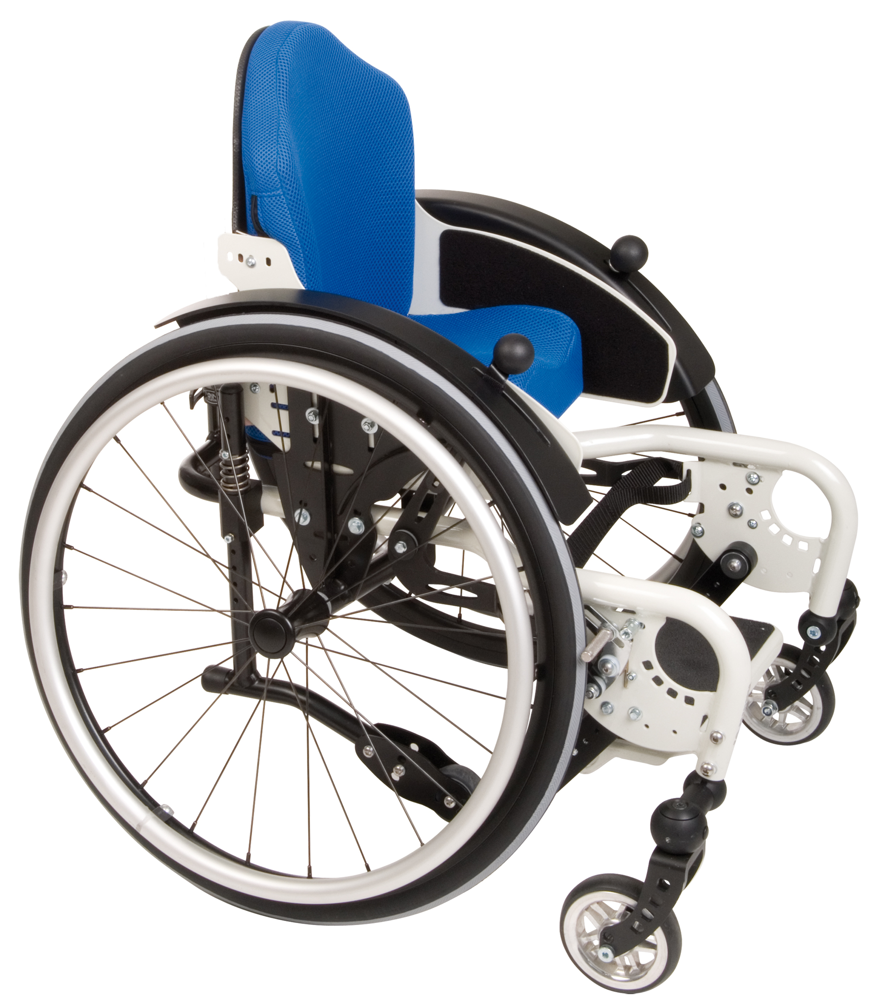 Sehr leichter und kleiner Kinder-Aktiv-Rolli (ab 6,5 kg) mit einer Sitzbreite und Sitztiefe bereits ab 14 cm. Besonders geeignet zur frühen Mobilisierung von sehr kleinen und schwachne Kinder ab ca. 12 Monaten.